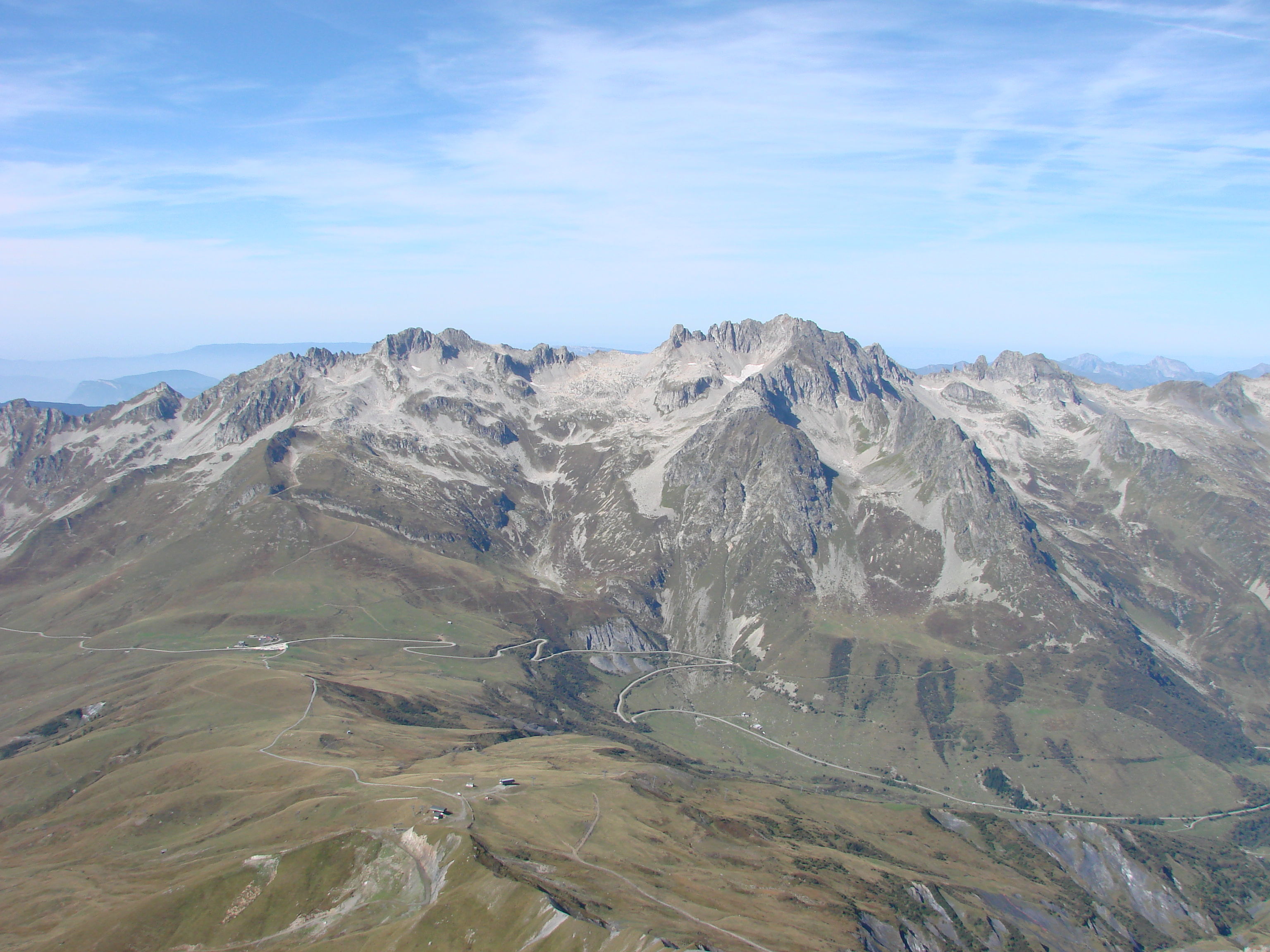 Le col de la Madeleine et le Grand Pic de la Lauzière depuis le sommet du Cheval Noir / Savoie / France